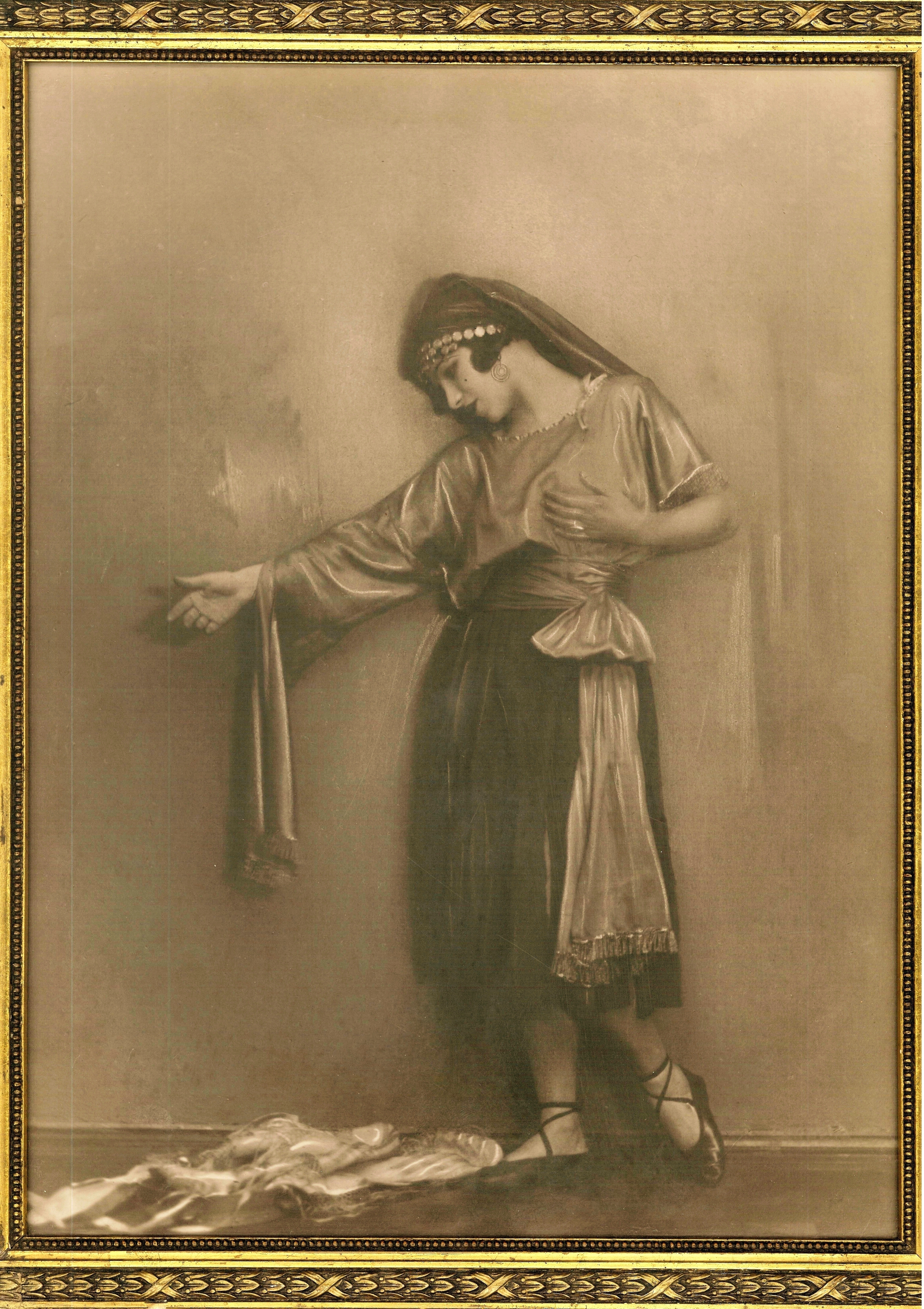 Lili Larys (Helena Maliszewska) Cyganka, Fot. Rembrandt, Lwów, 1929 - własność Jerzy Płaczkiewicz, Katowice, 2016 - II wersja koloryst.